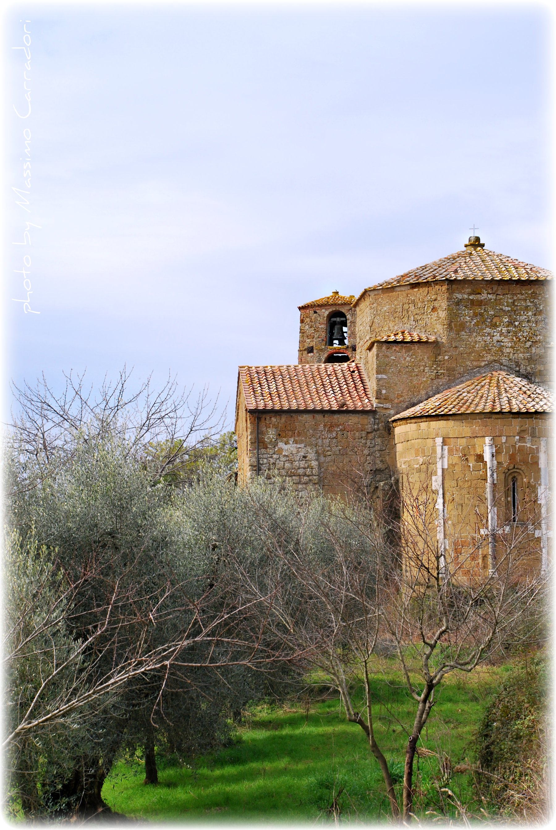 La Chiesa appare come uno dei più fulgidi esempi di transizione Romanico-Gotica comprendendo architettonicamente archi a tutto sesto ed a sesto acuto The Church appears as one of the most shining examples of Romanesque-Gothic including architectural arches and Arch. The Church appears as one of the most shining examples of Romanesque-Gothic including architectural arches and Arch.